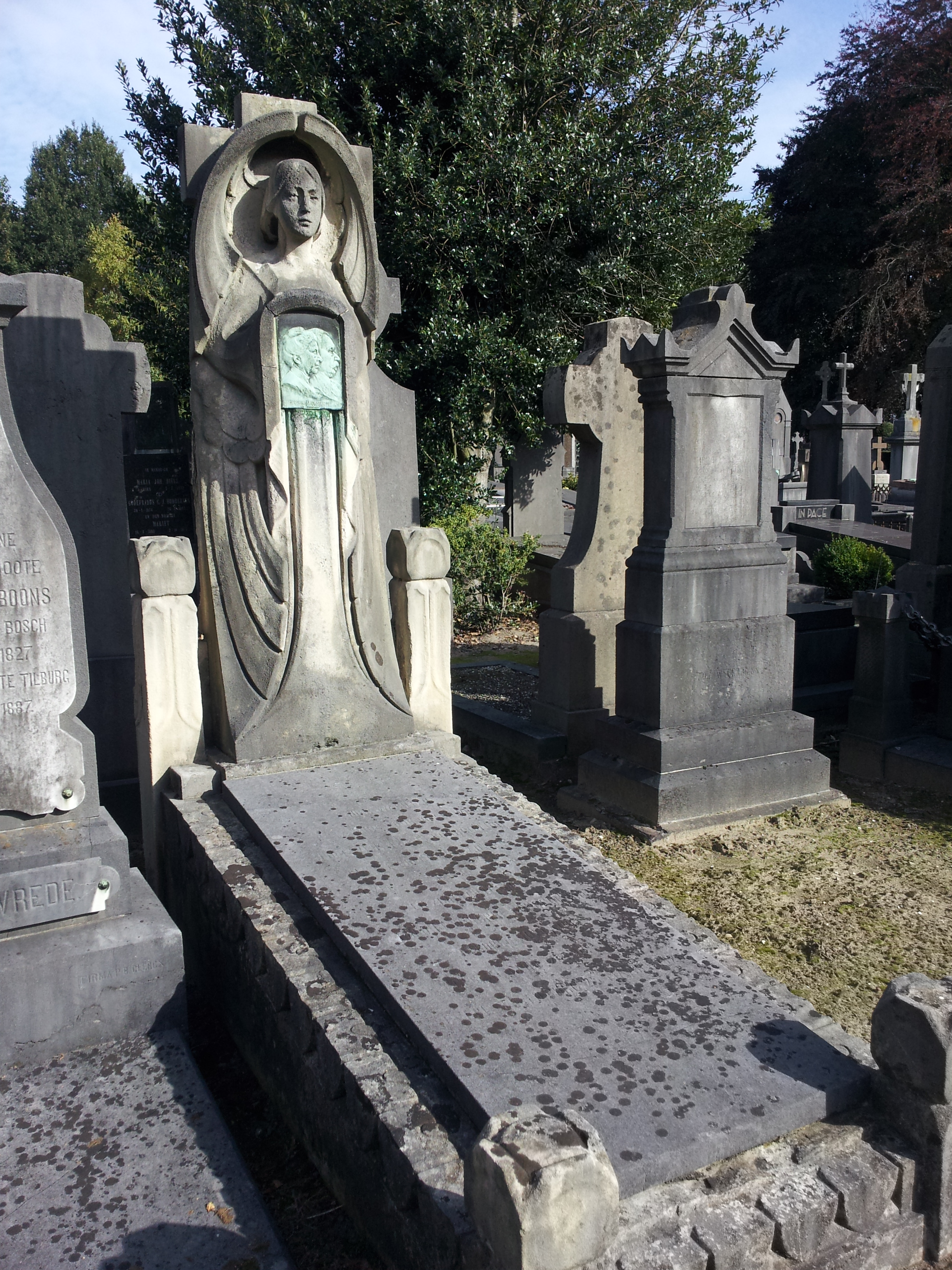 Grafmonument echtpaar Bourgonjen Roeland, Begraafplaats Binnenstad, Tilburg